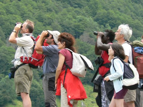 Un groupe de randonneurs encadrés et accompagnés par l'Observatoire de la montagne afin d'observer le gypaète barbu dans la Réserve Nationale d'Orlu. Lors de ce séjour écotouristique, les participants ont pu découvrir la faune de montagne et observer un des plus rares oiseau d'europe.